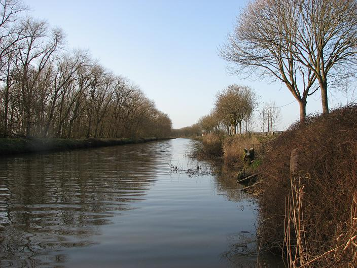 De Ieperlee kort voor de monding in de IJzer. Zelfgemaakte foto.